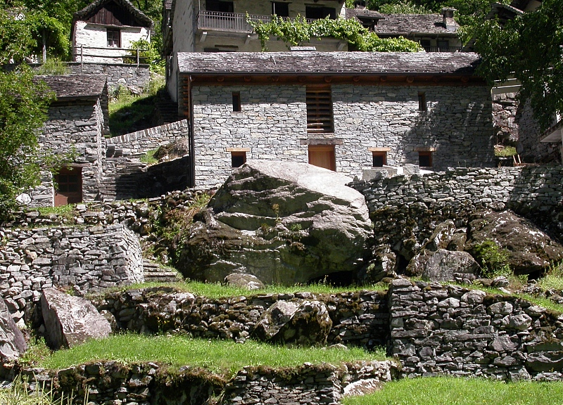 Valle Maggia, Ticino, Switzerland